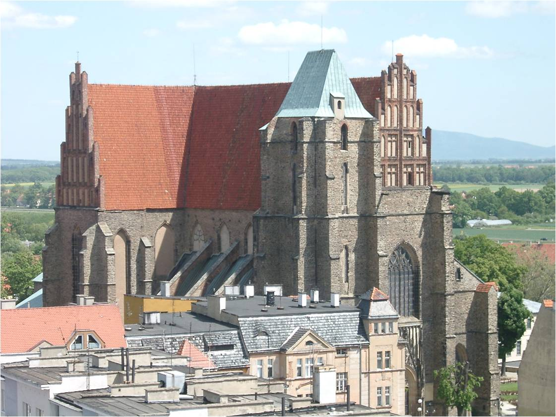 Bazylika mniejsza w Strzegomiu